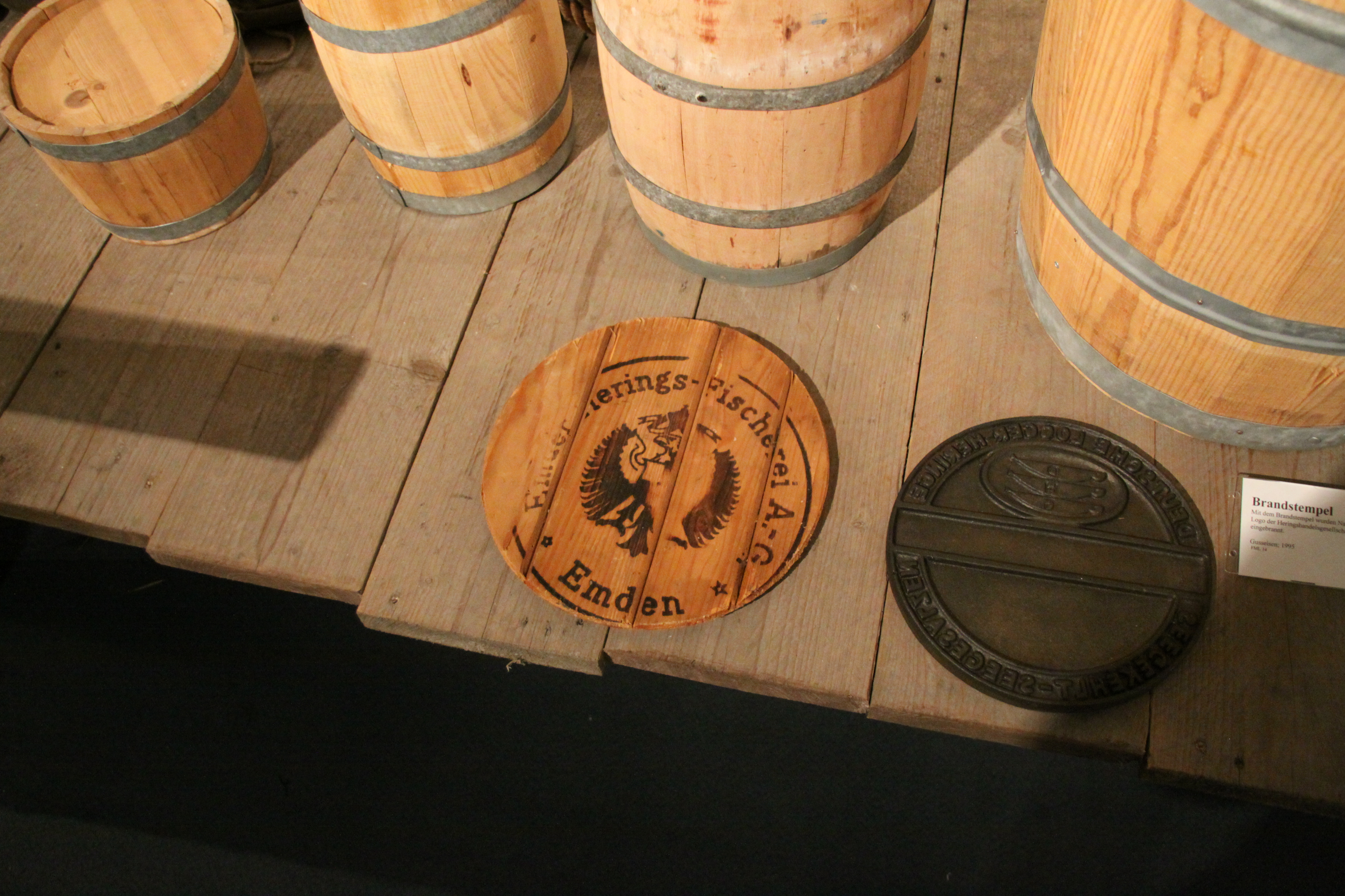 Siegel der Emder Heringsfischerei